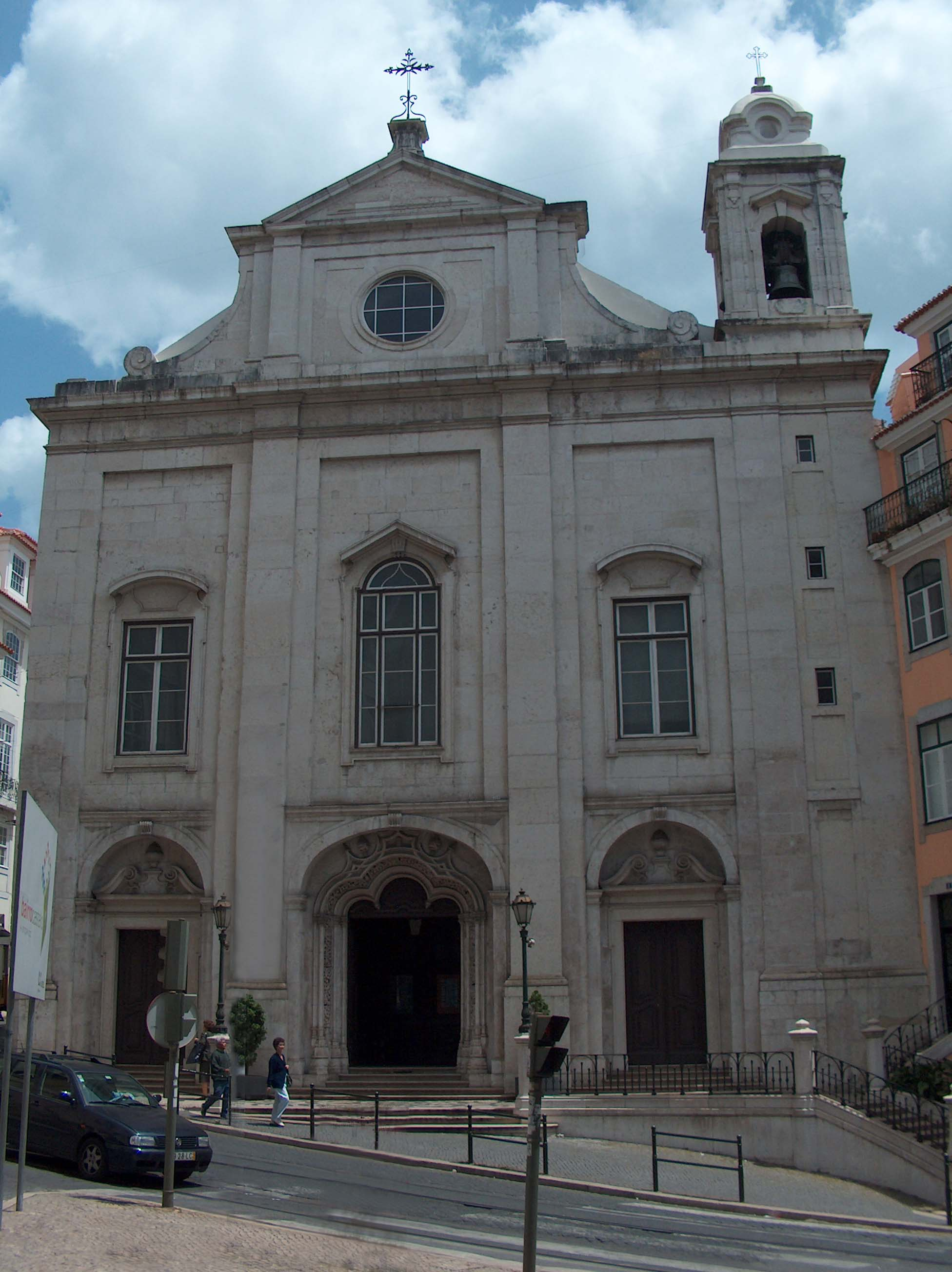 Igreja da Madalena em Lisboa